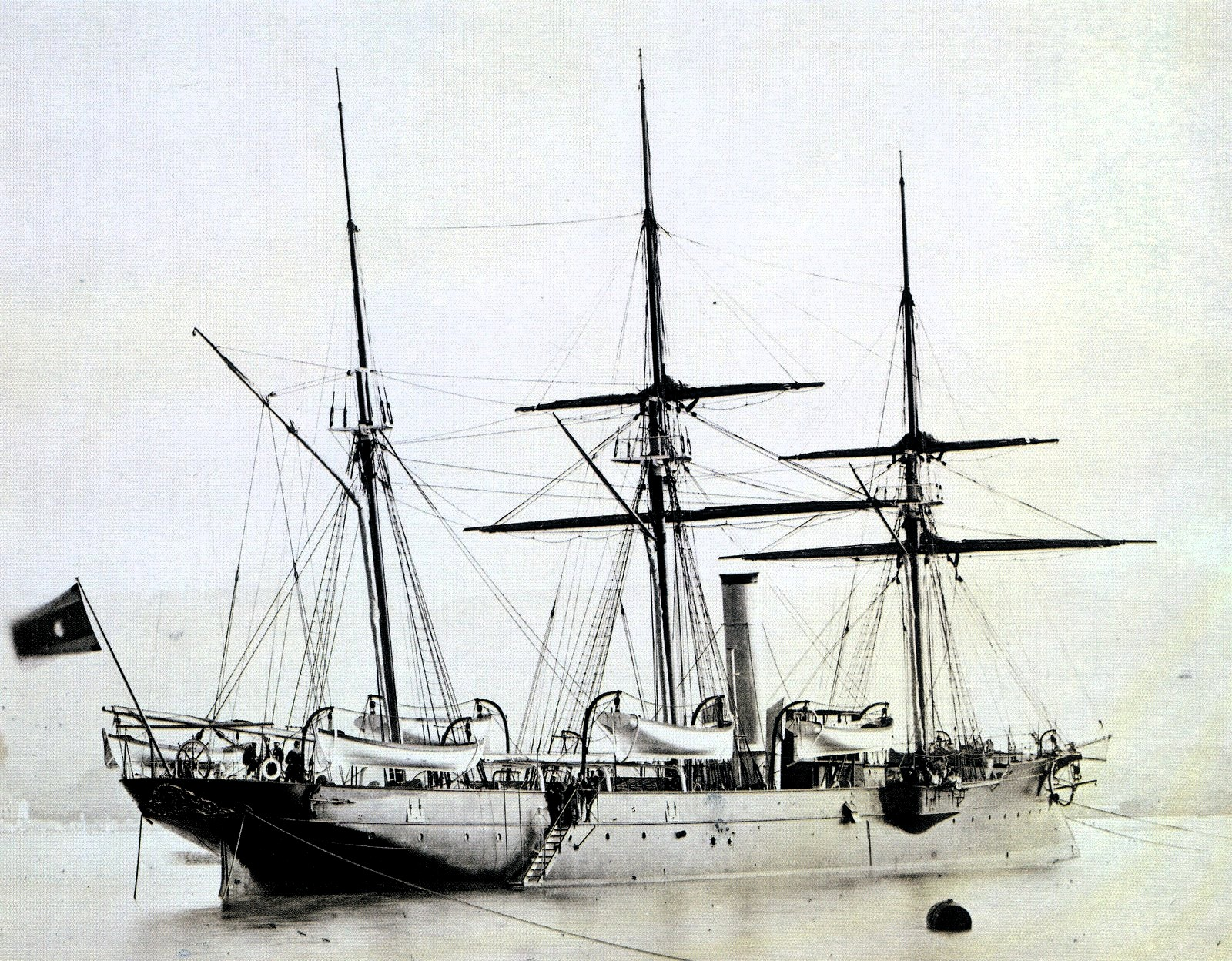 El buque vapor aviso Jorge Juan, fue un buque de hélice de la Armada española (1876-1898)